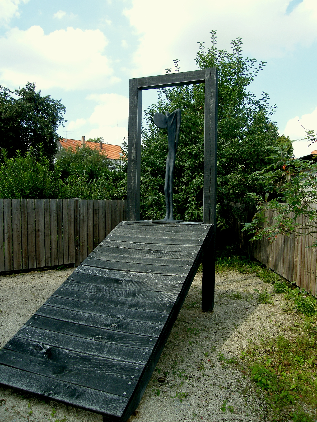 Vöhl ehem. Synagoge in der Mittelgasse - Mahnmal